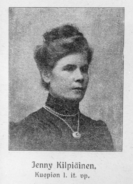 kansanedustaja Jenny Kilpiäinen, lehtileike; Jenny Kilpiäinen pysty, mustavalkoinen, reproduktio, liimattu kartongille